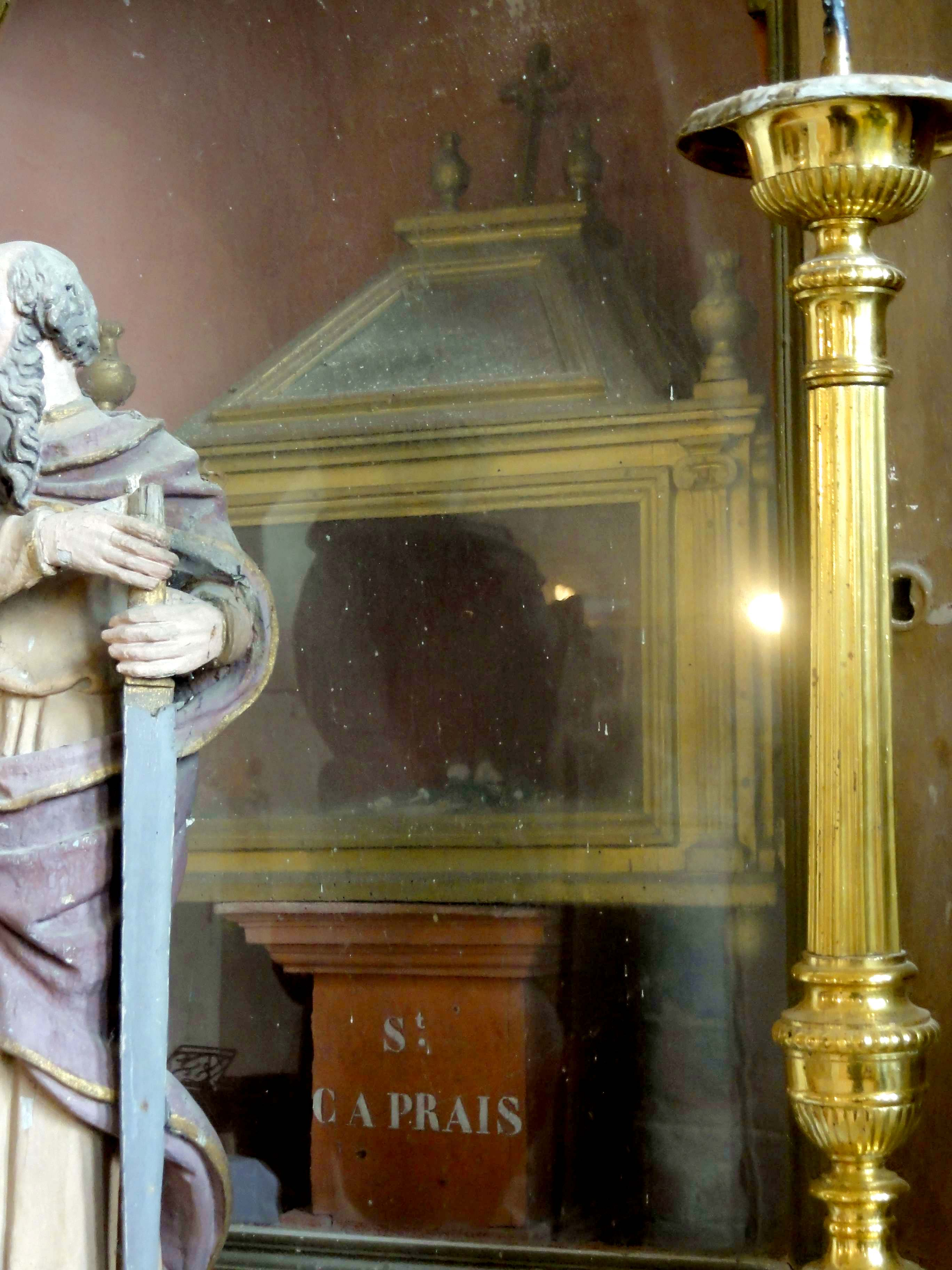 Châsse-reliquaire de saint Caprais, patron de la paroisse.